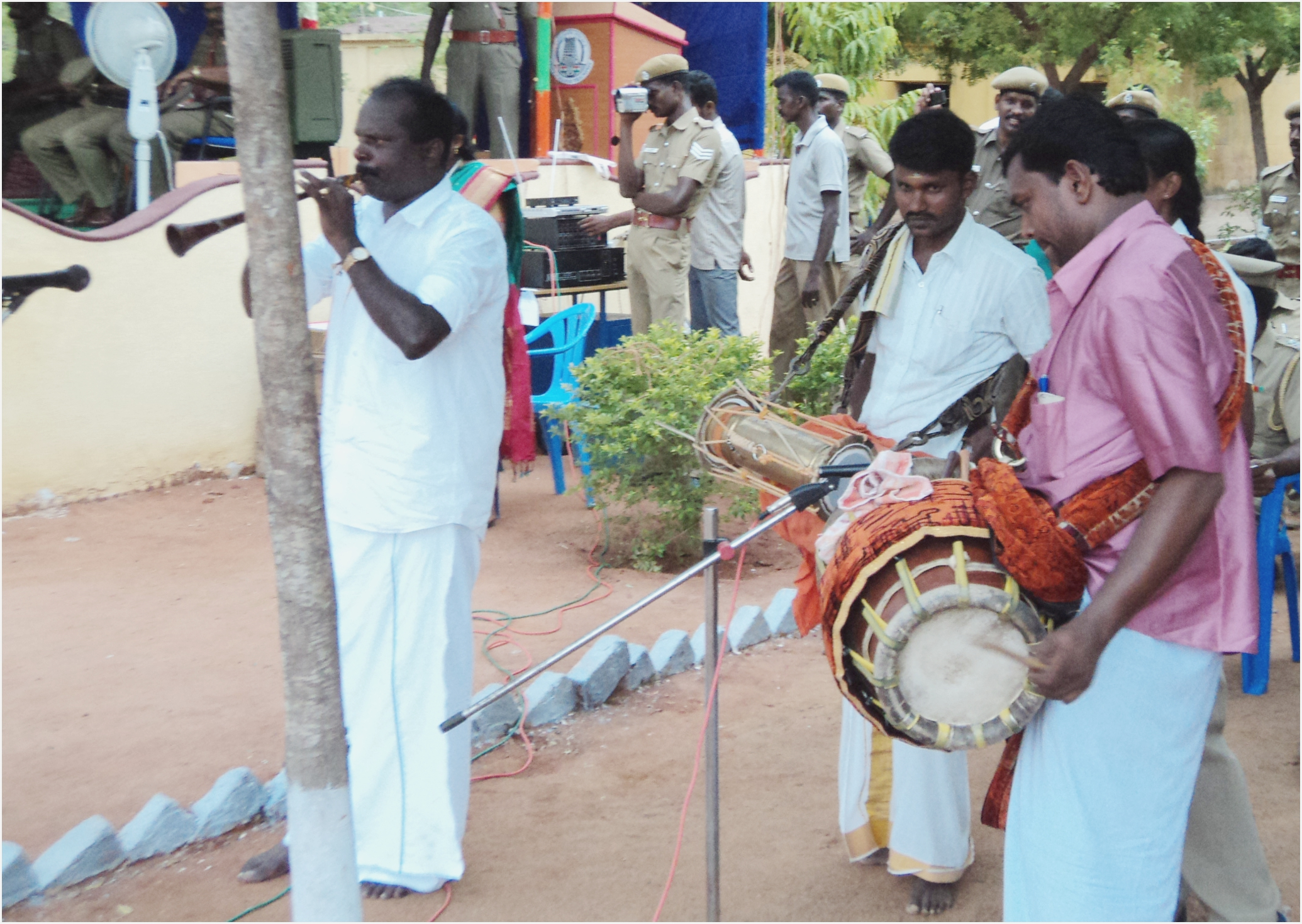 the dance musicians,Karakattam,Tamil Nadu